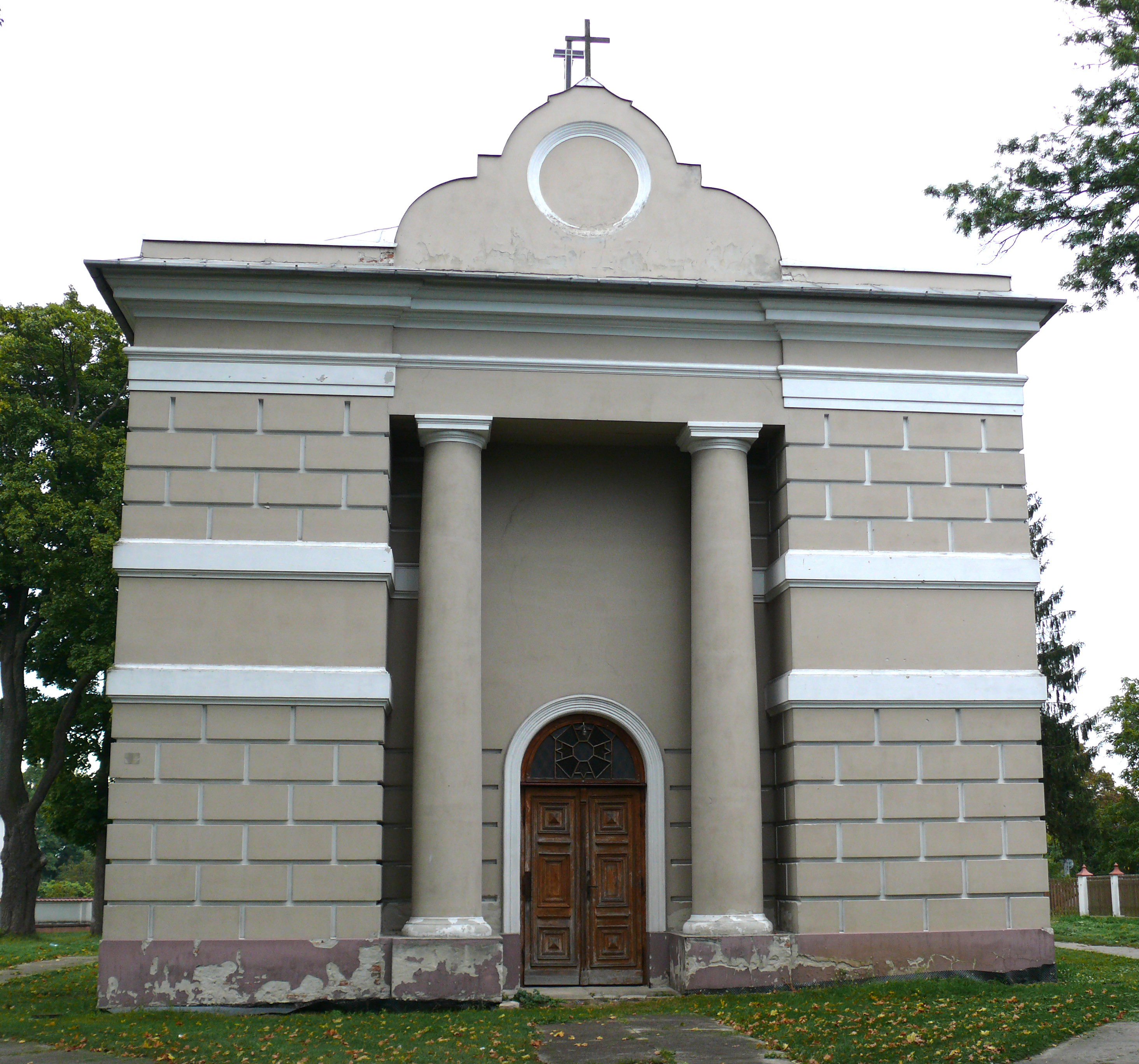 Kościół dominikanów, obecnie fil. p.w. św. Jana Chrzciciela (1790-1801) ul. Skalskiego 22, Janów Podlaski, powiat bialski, woj. lubelskie (Zabytek nr. A/78) 11.1966.